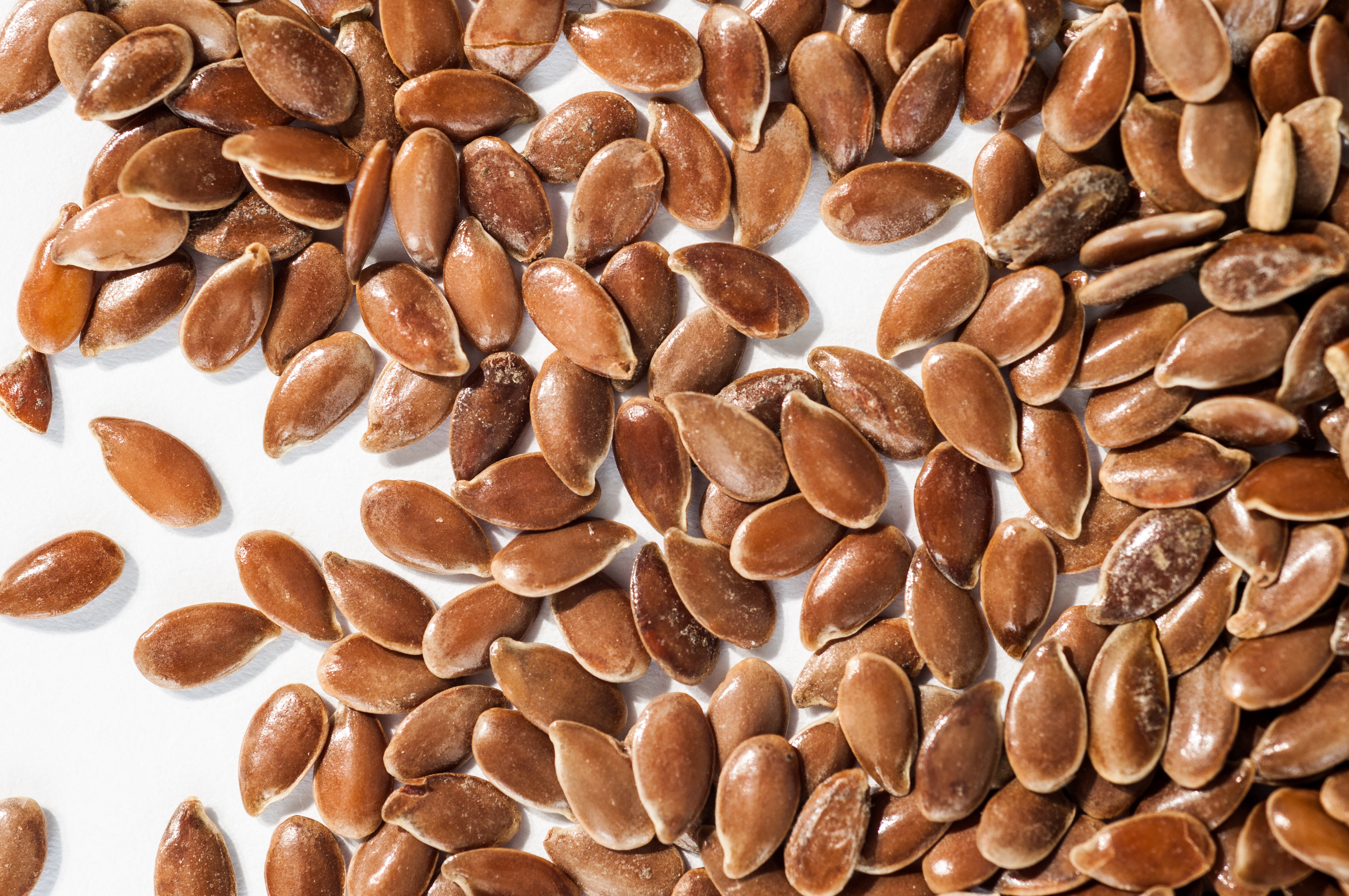 Graines de Lin